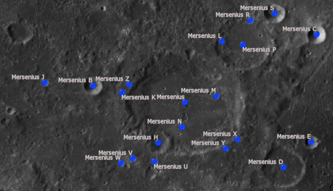 Cráter lunar Mersenius. Cráteres satélite. (Imagen LRO)